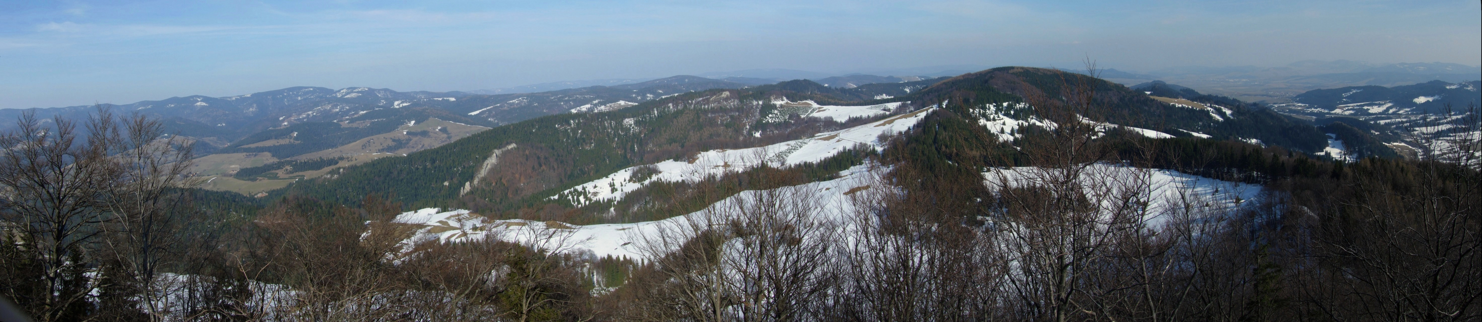 Beskid Sądecki i Małe Pieniny, widok z Wysokich Skałek